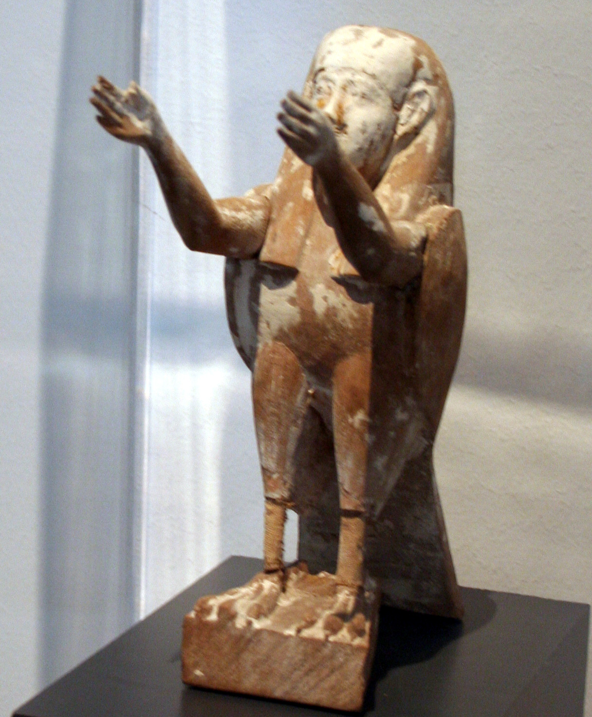 Hildesheim'de çıkarılmış antik bir eser.